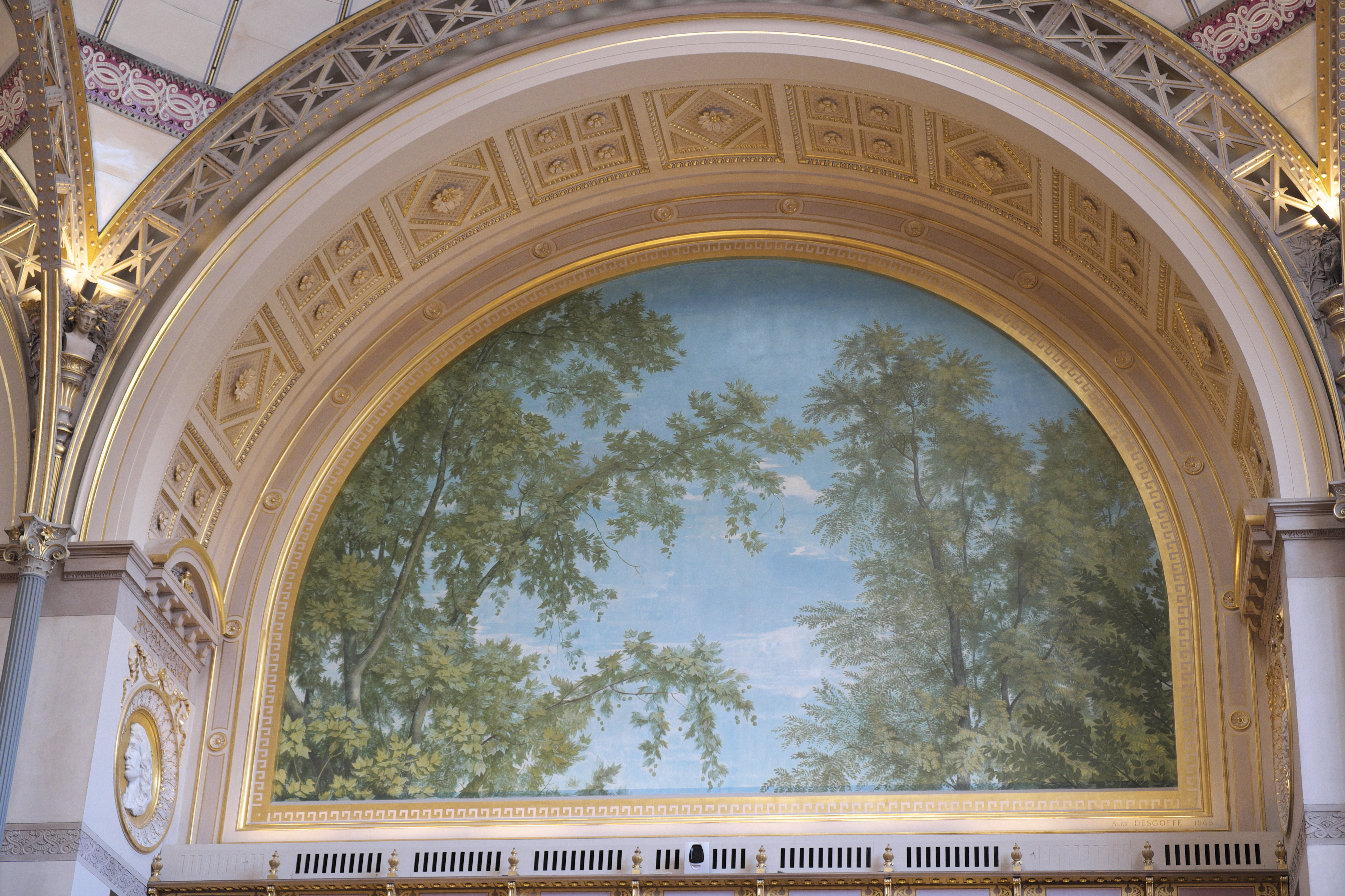 Lesesaal, Salle Labrouste, der Bibliothèque nationale de France, Site Richelieu-Louvois im 2. Arrondissement von Paris